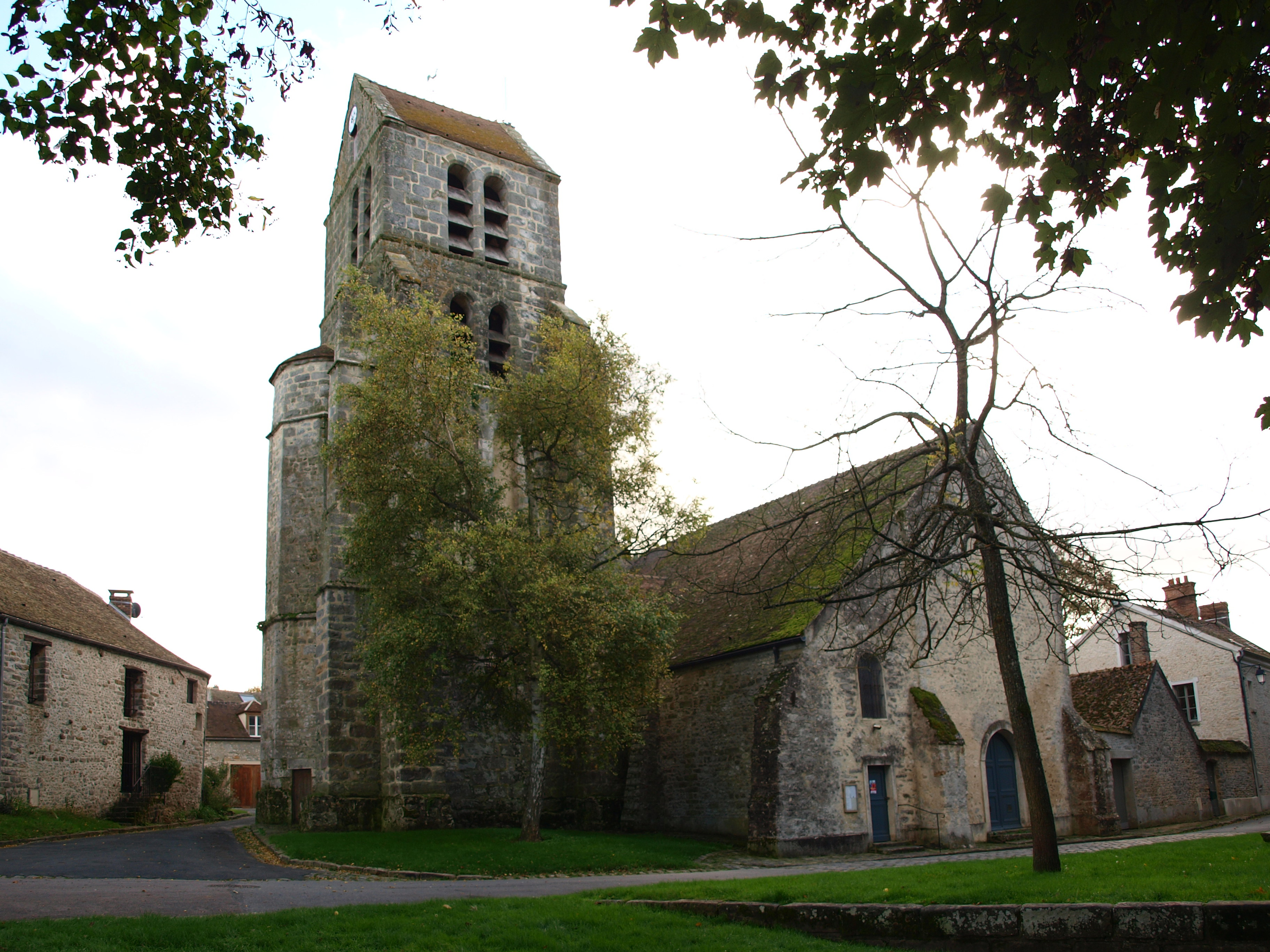 Courances (Essonne ; France) ; église